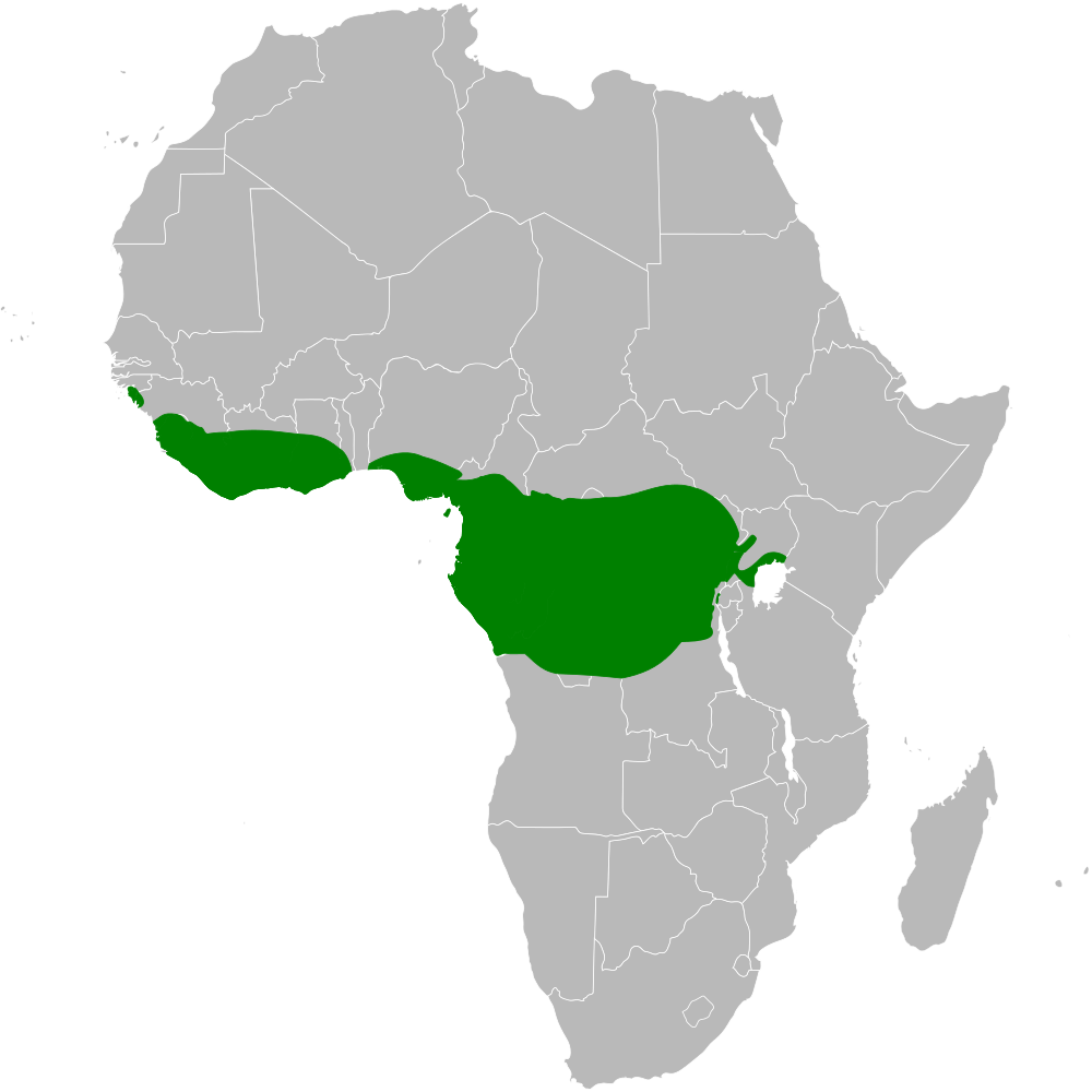 Criniger distribution map